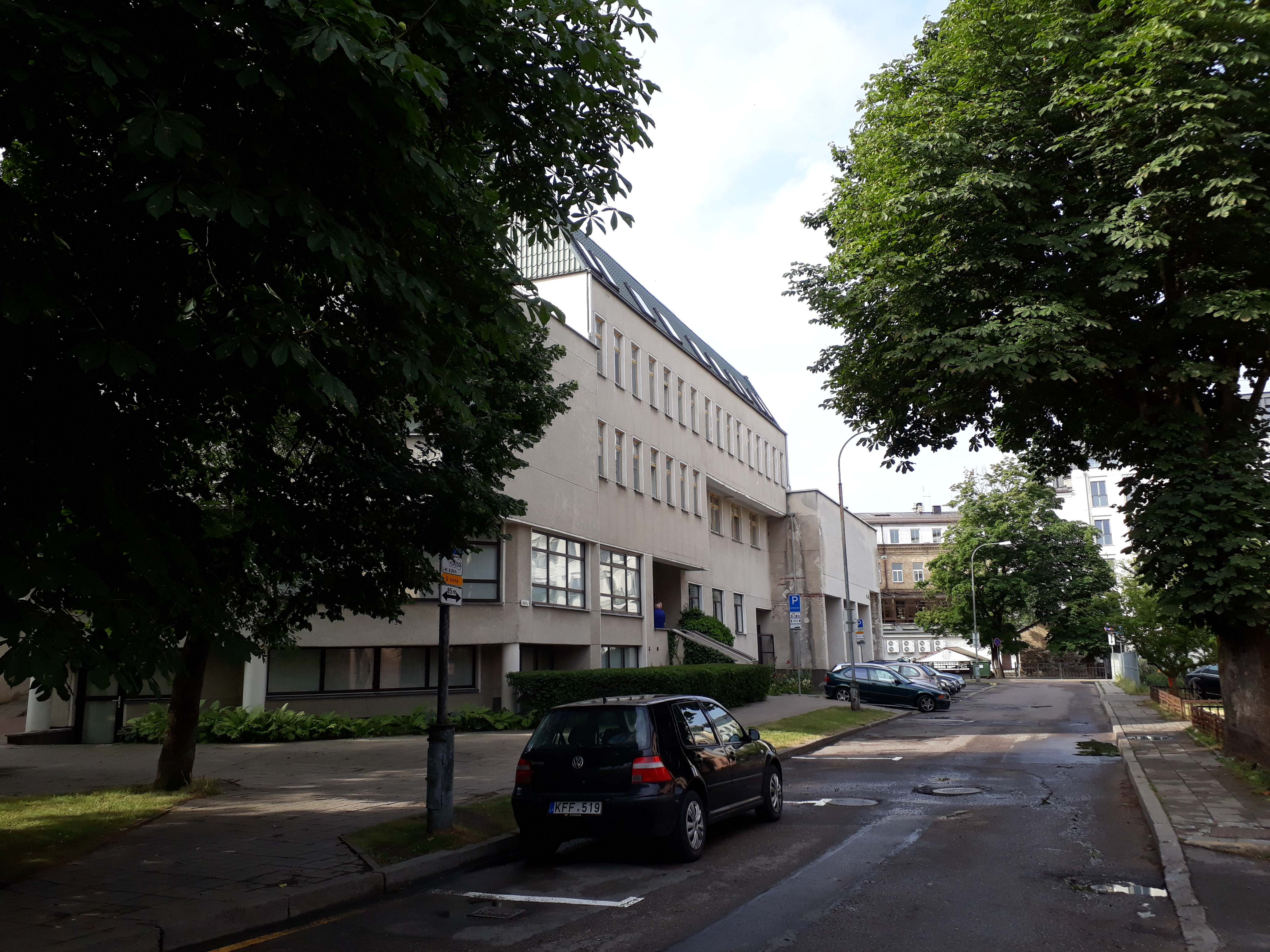 Lietuvos istorijos instituto buveinė